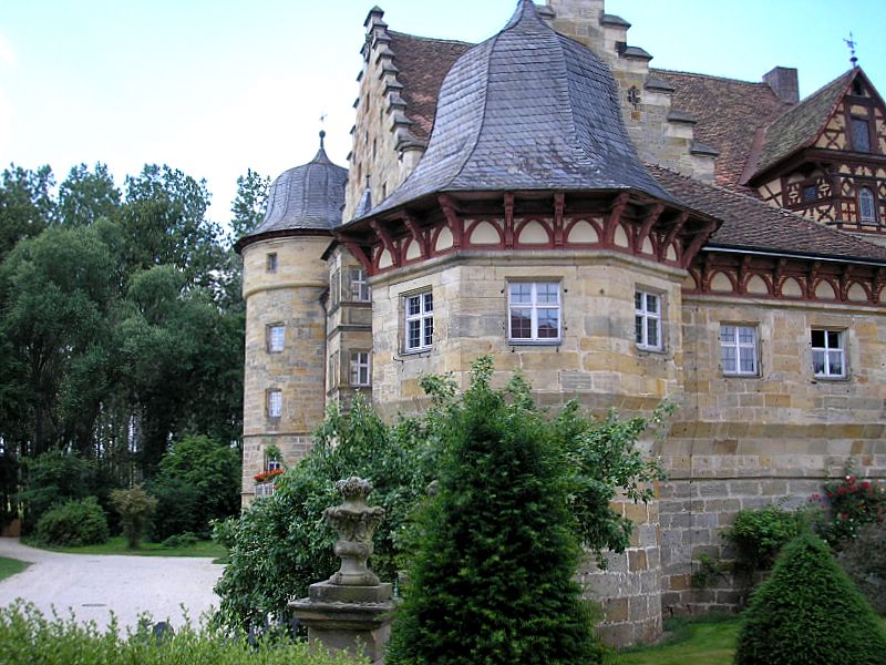 Schloss Eyrichshof bei Ebern (Unterfranken) / Eyrichshof Castle near Ebern, Lower Franconia, Germany. Ansicht von Südosten / View from southeast. Eigene Aufnahme, Juni 2006 / Own photo, June 2006